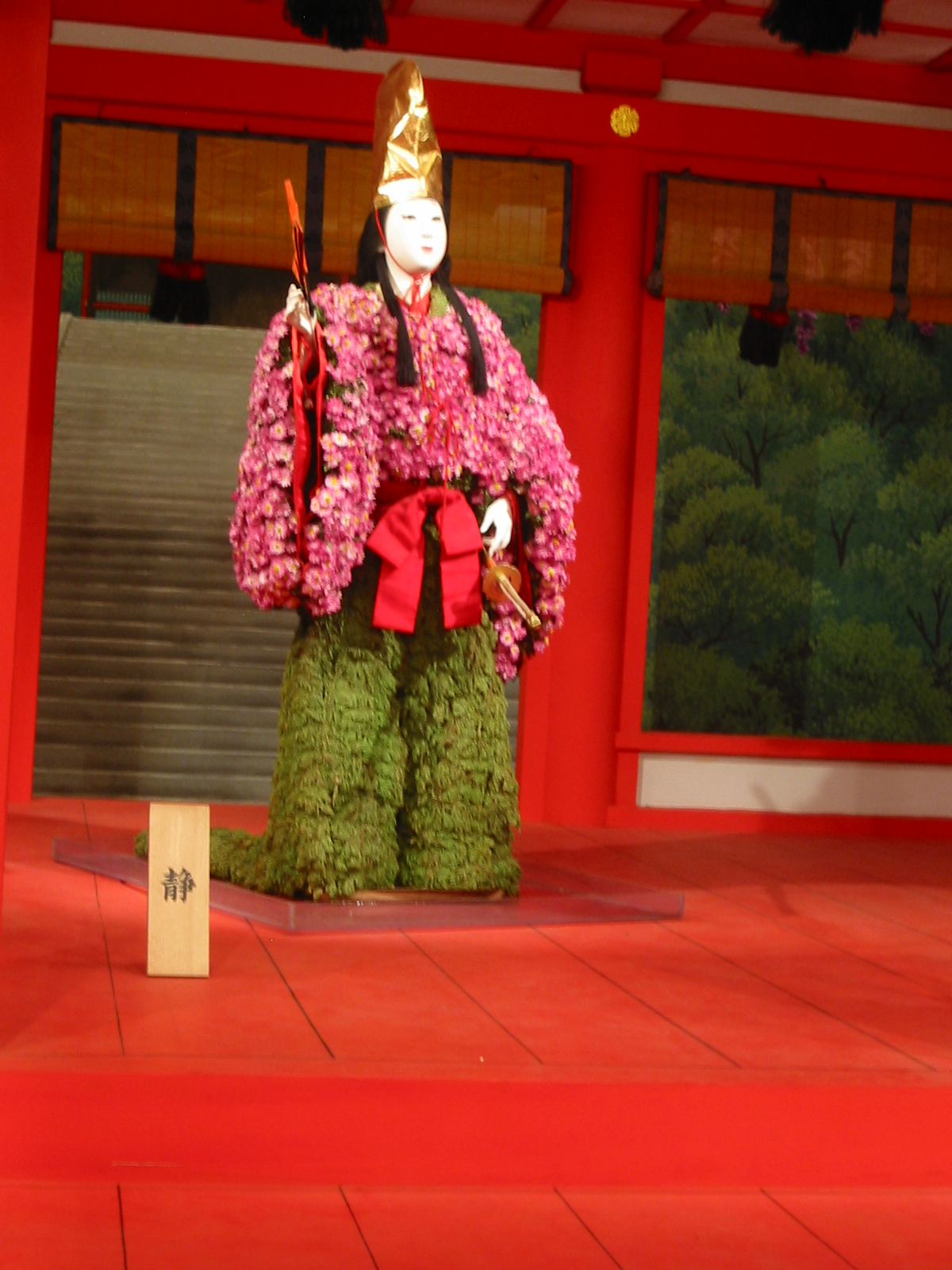 ひらかた大菊人形 義経 第九場面 静の舞